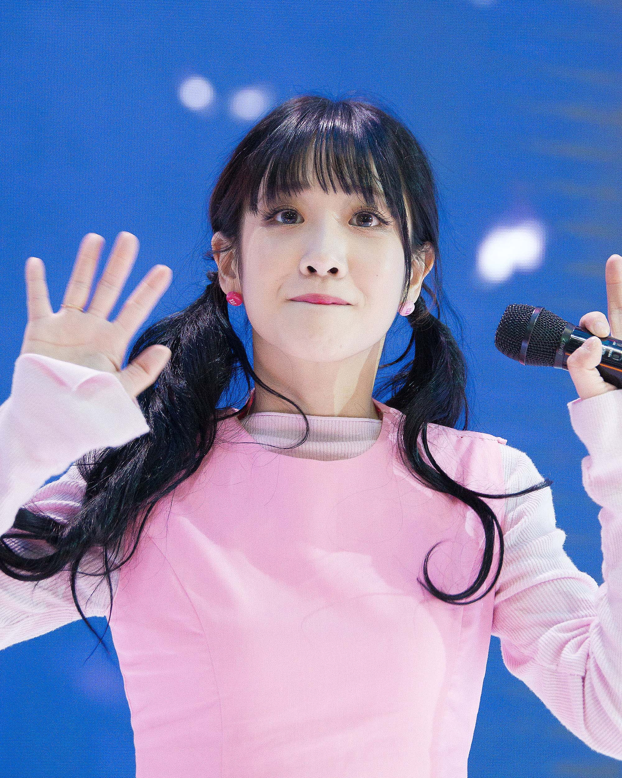 20170409 러블리즈 서울모터쇼 축하공연